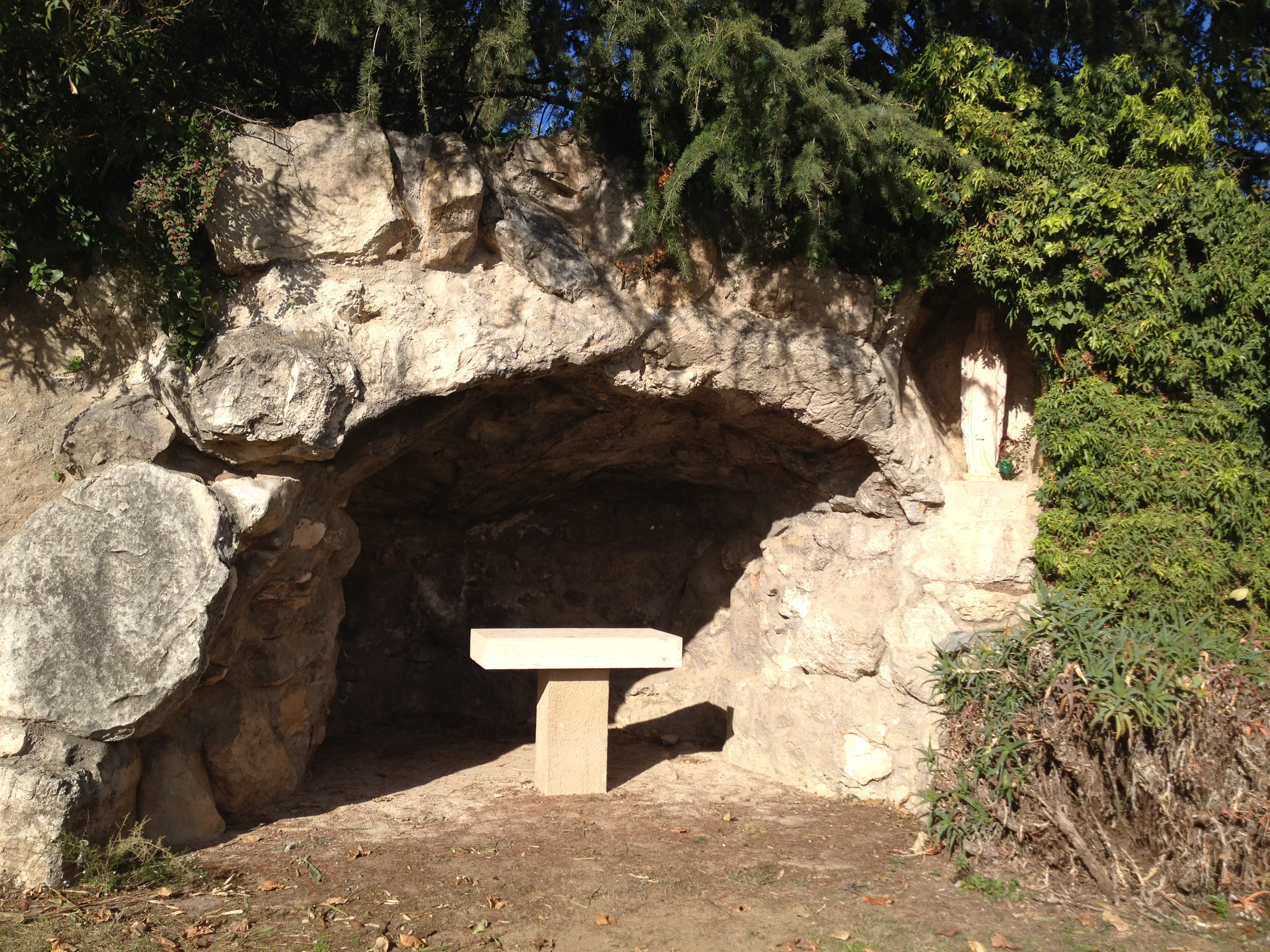 Capella de la Mare de Déu de Lorda, situada al costat del Casal de la Visitació o Can Xammar de Baix